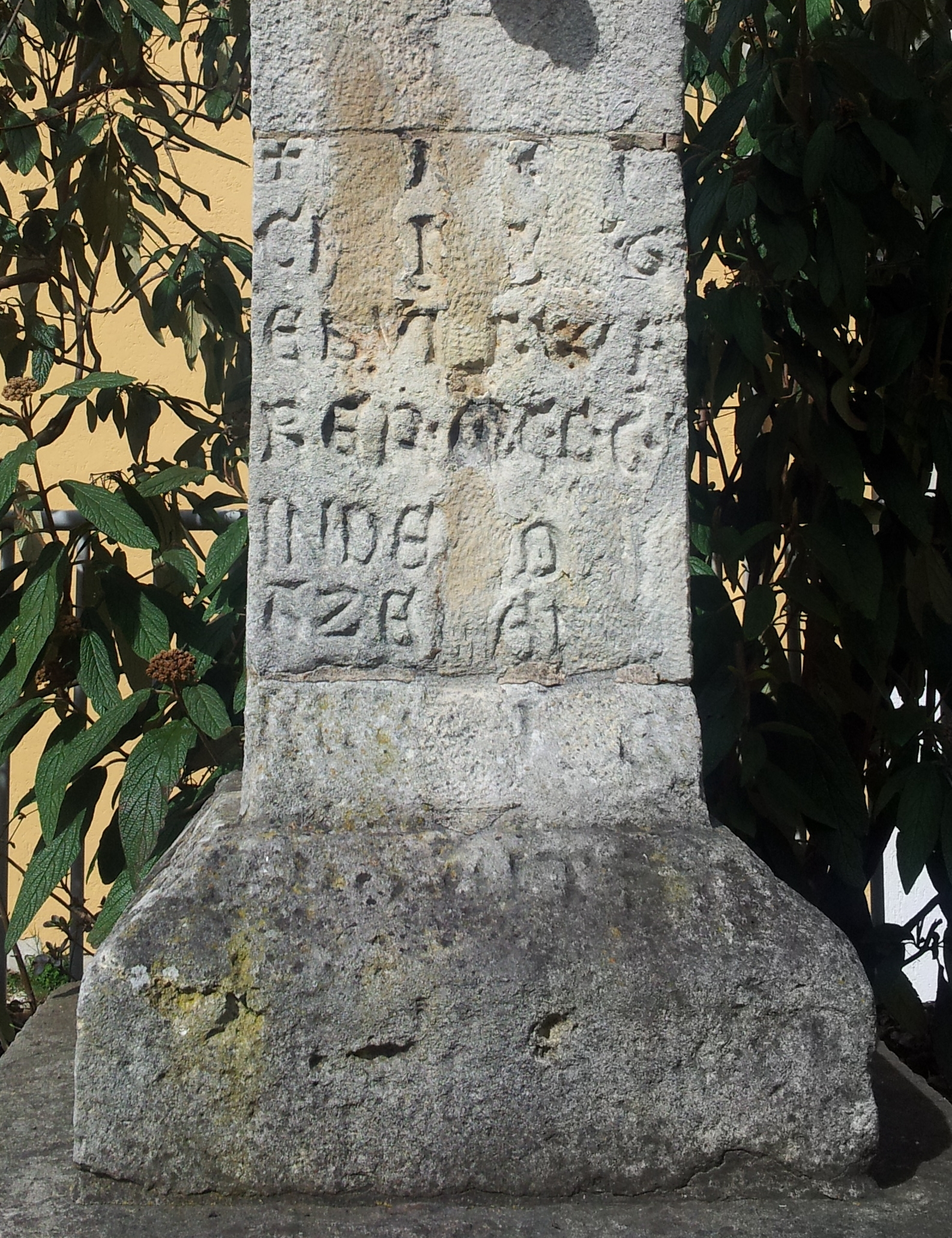 Die heute nicht mehr lesbare Inschrift am Zantkreuz in Regensburg-Kumpfmühl.